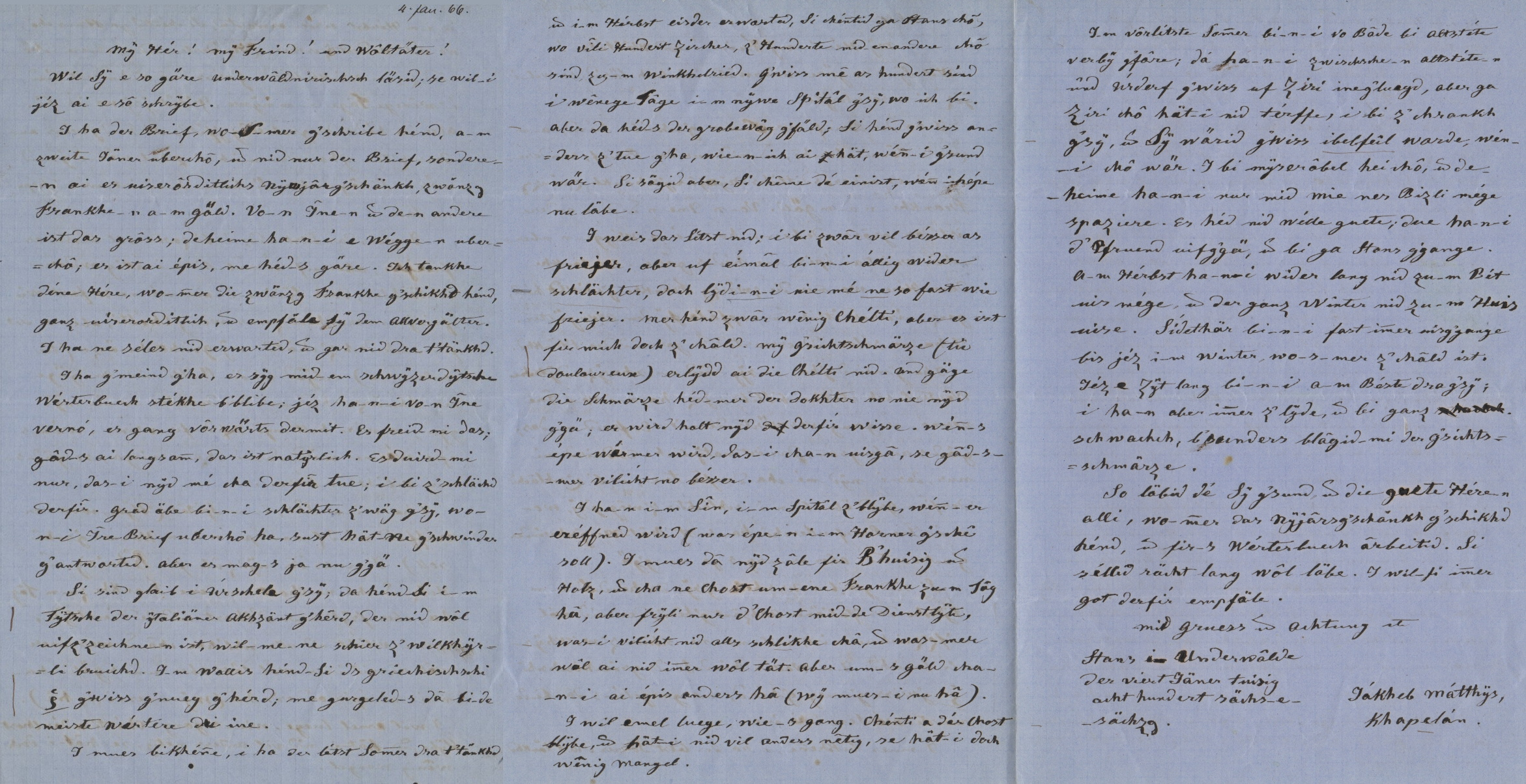 Brief von Jakob Joseph Matthys, Stans, an Friedrich Staub, Zürich, vom 4. Januar 1866